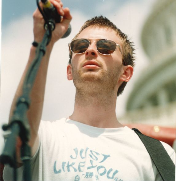 Wash D.C. 1998